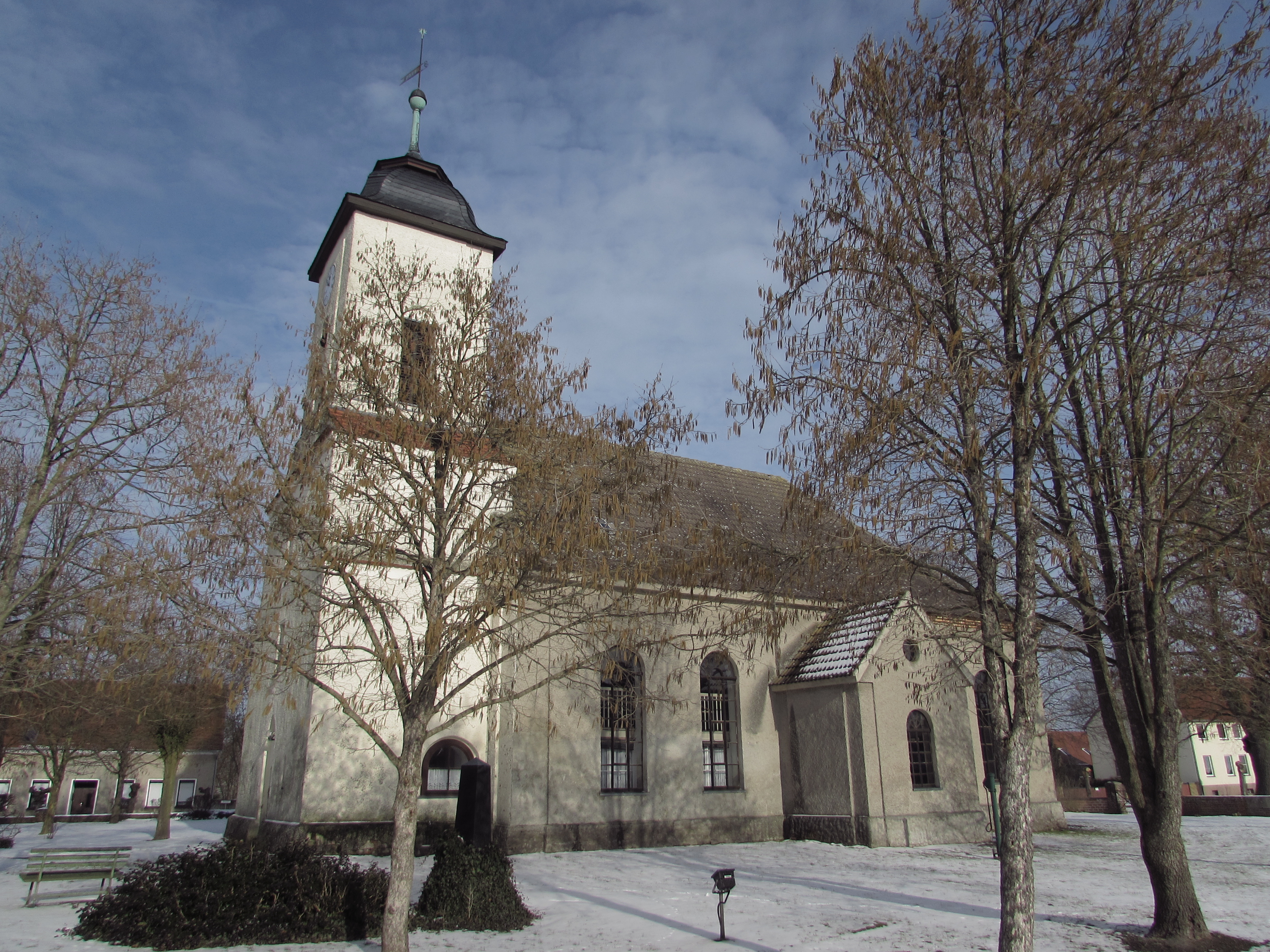 dorfkirche fohrde von südwesten